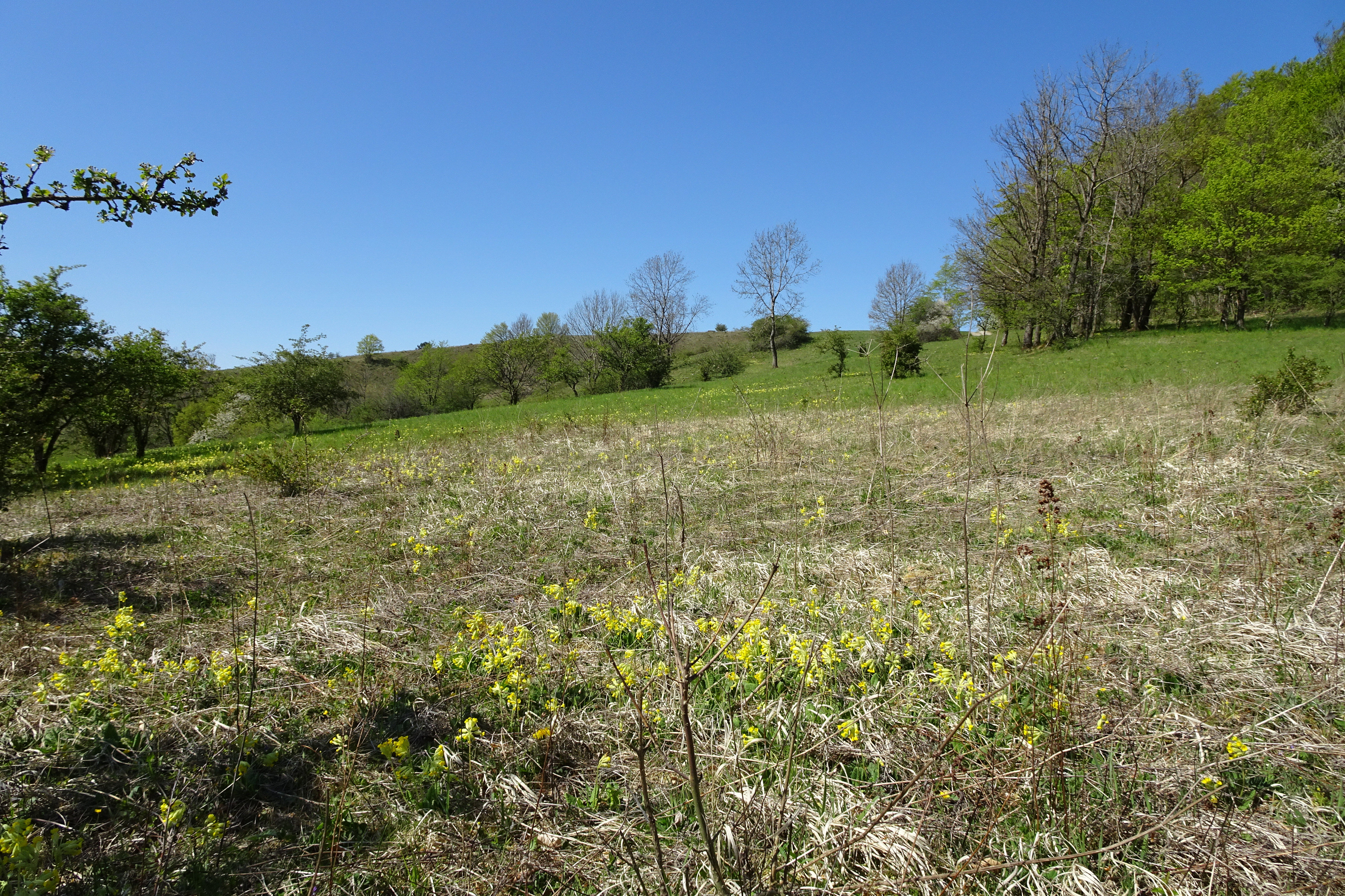 Der „Hohekopf bei Großalmerode“ erhebt sich mit einer Höhe von 539,4 m östlich von Epterode aus der Mittelgebirgslandschaft der Söhre im nordhessischen Werra-Meißner-Kreis. Auf dem Bergrücken und einer östlich angrenzenden Senke haben sich Halbtrockenrasen und Sumpfwiesen entwickelt, die zum Lebensraum seltener Pflanzen und Tiere geworden sind. Um den Standort stark gefährdeter Arten zu erhalten und fortzuentwickeln wurden knapp vierzehn Hektar, auf dem umgangssprachlich auch Epteröder Kopf genannten Gipfel, im Jahr 1986 als Naturschutzgebiet ausgewiesen. Mit rund 49 Hektar, durch eine Erweiterung mit südlich angrenzenden Flächen, ist dieser Bereich später auch als gleichnamiges Flora-Fauna-Habitat-Gebiet zu einem Teil des europaweiten Schutzgebietssystems „Natura 2000“ geworden, das eine länderübergreifende Vernetzung von bedrohten Lebensräumen zum Ziel hat.